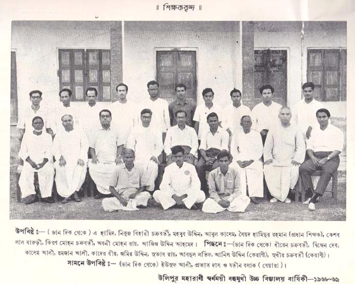 উলিপুর মহারাণী স্বর্ণময়ী উচ্চবিদ্যালয় ও কলেজের প্রাক্তন বরেন্য শিক্ষকবৃন্দ ও কর্মকর্তাগন।